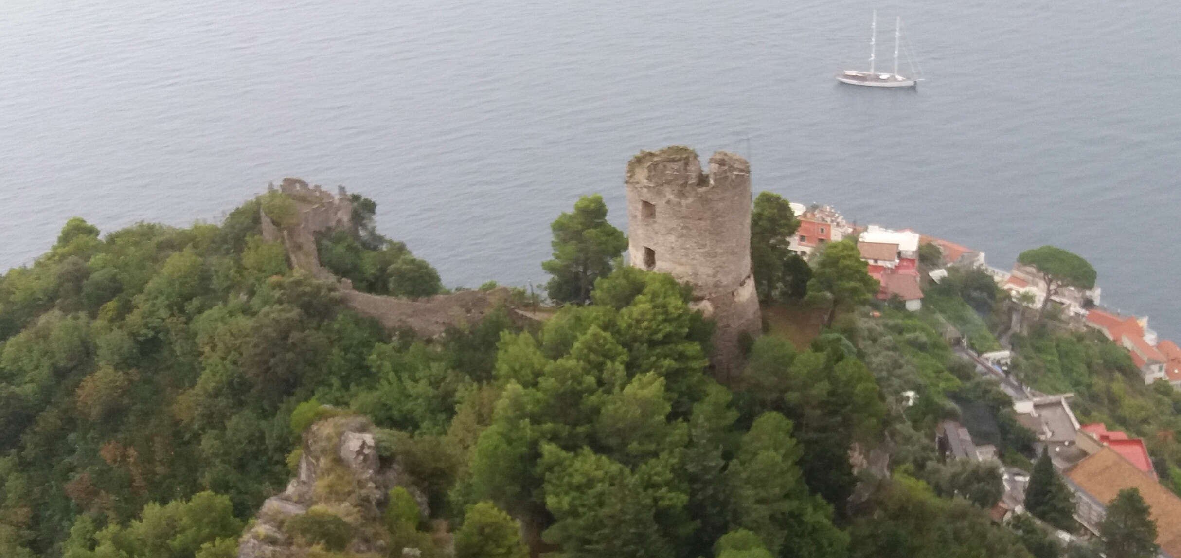 panorama